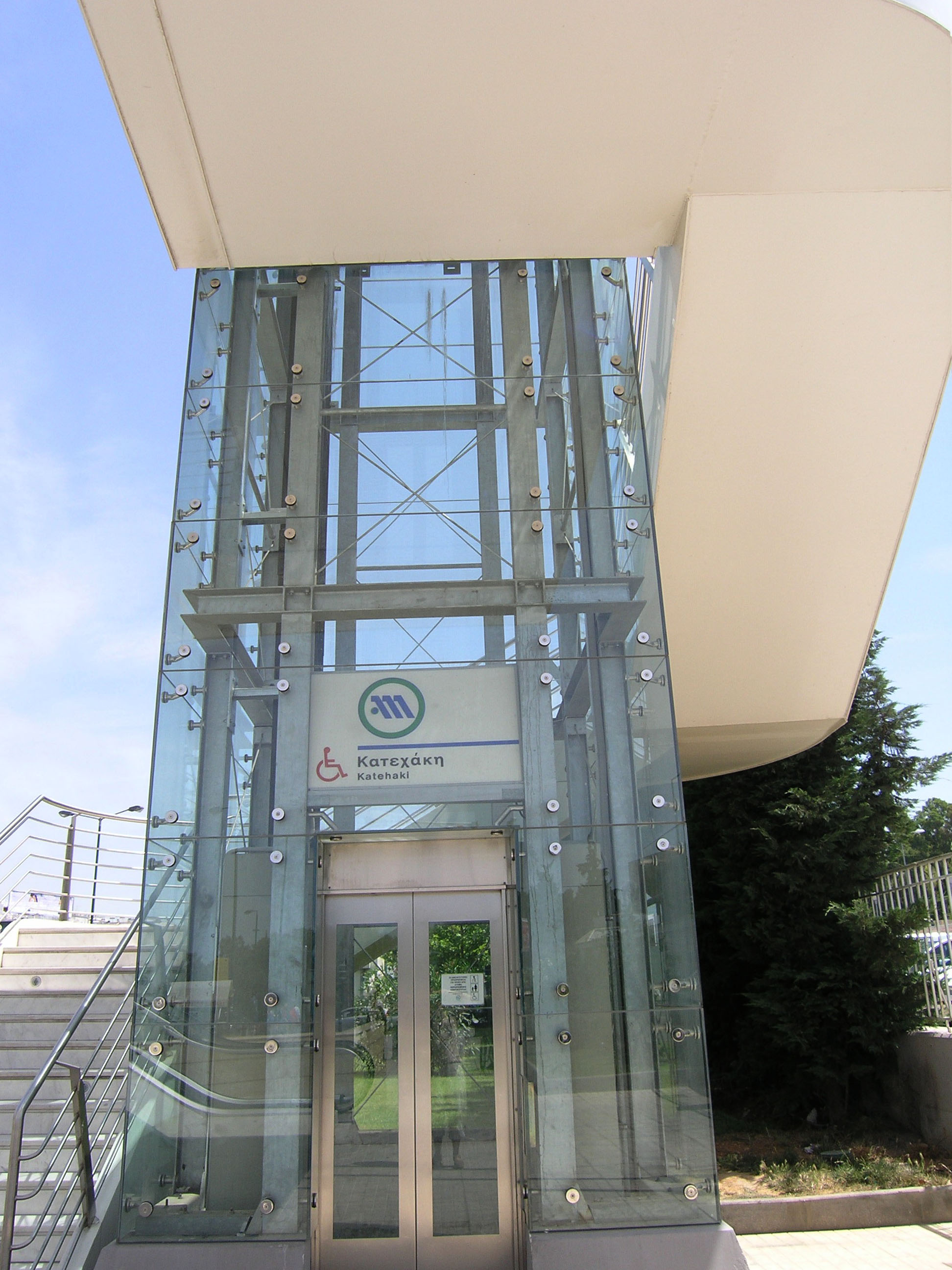 Katehaki Metro Station, Athen